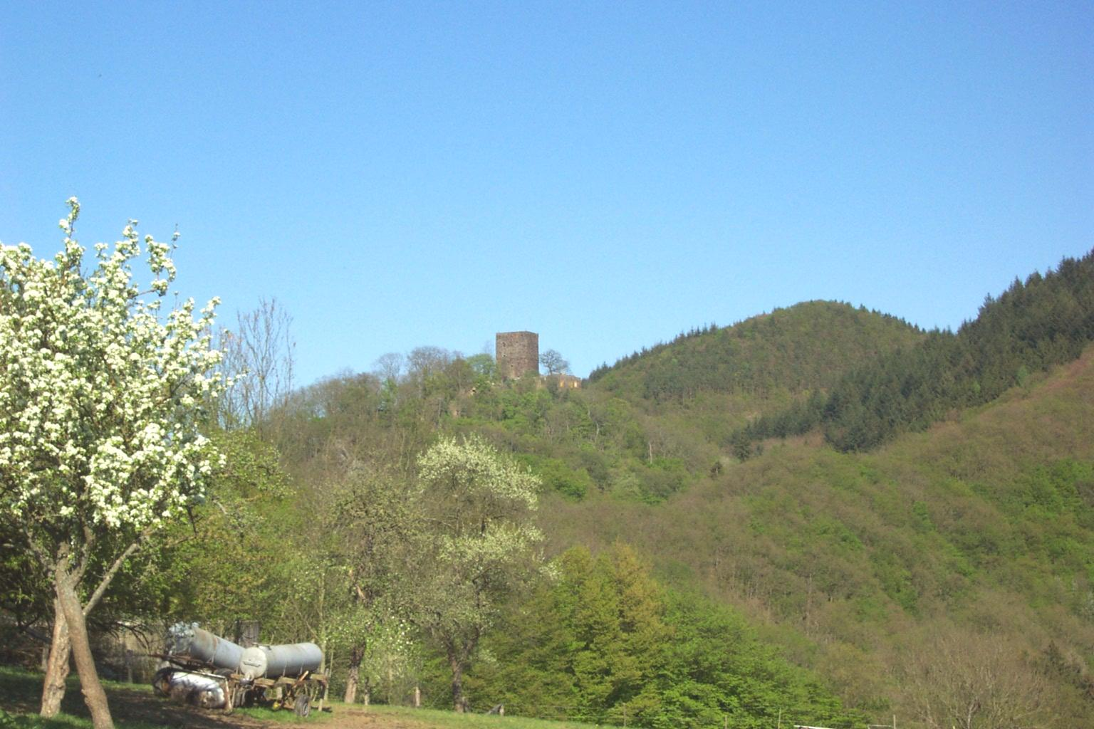 Die Neuerburg in Niederbreitbach